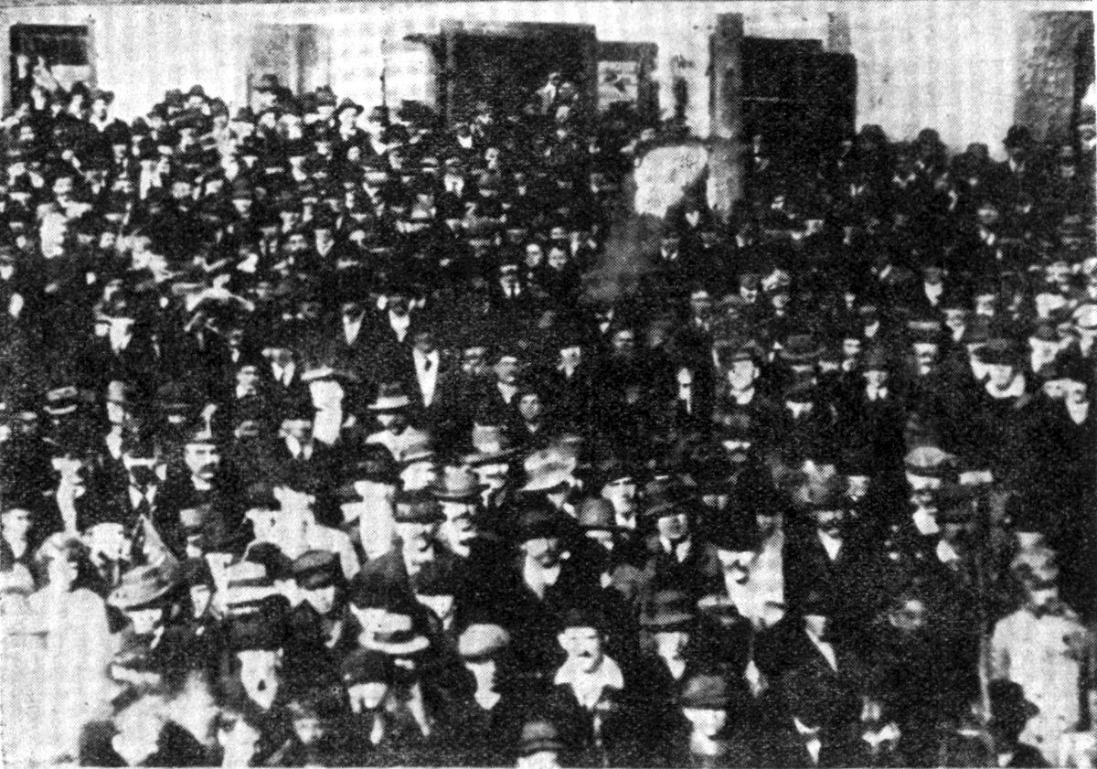 Srpskohrvatski / српскохрватски: Radnički zbor u Zagorju pred generalni štrajk solidarnosti održan u celoj Jugoslaviji juna 1919. godine protiv intervencija u mladim sovjetskim republikama u Rusiji i Mađarskoj.